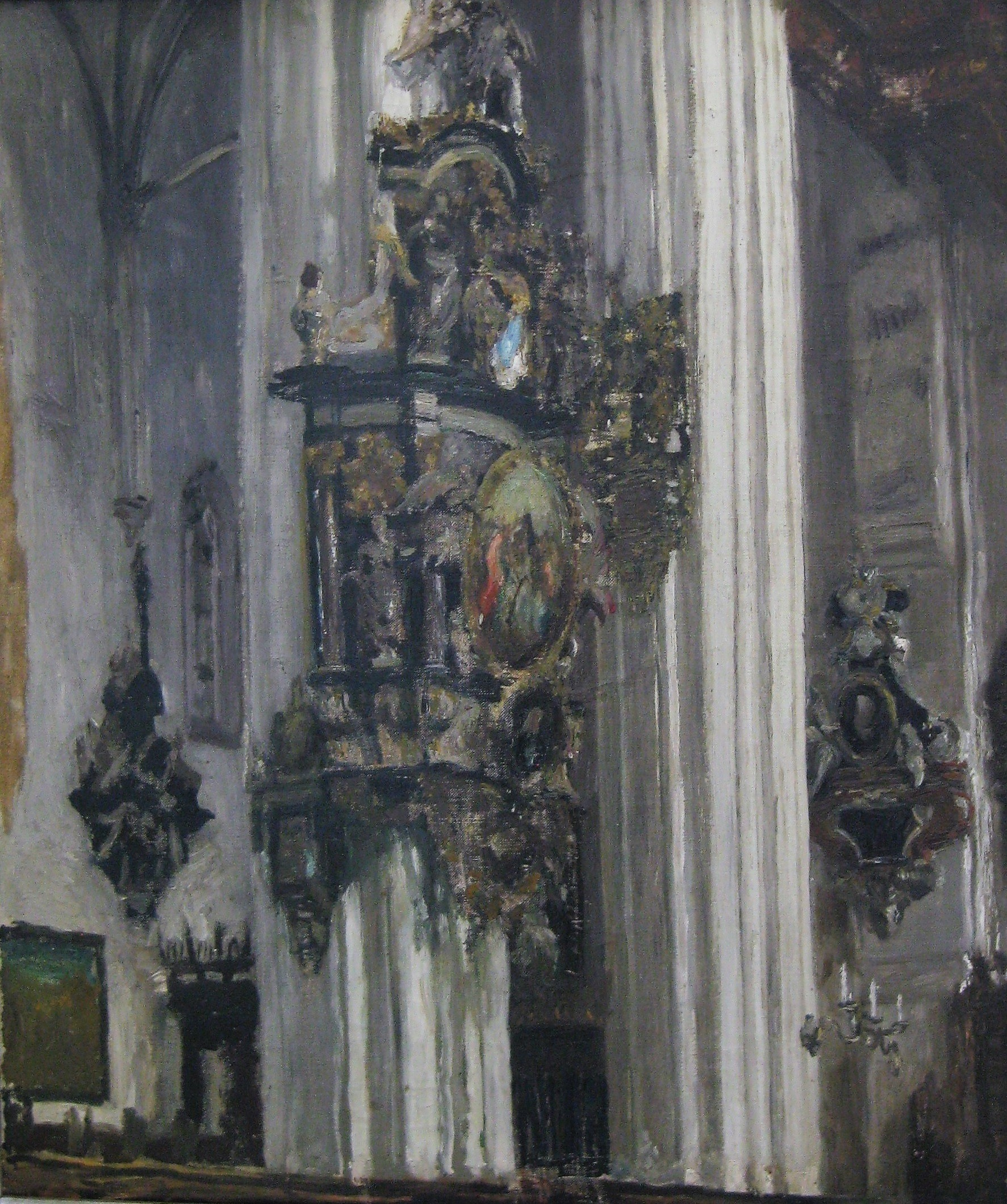 Gemälde von Heinrich Fricke (1860 - 1917), Marienkirche zu Lübeck, Pfeiler-Epitaph, um 1915, Öl auf Leinwand, 61 x 51 cm, Norddeutsche Privatsammlung